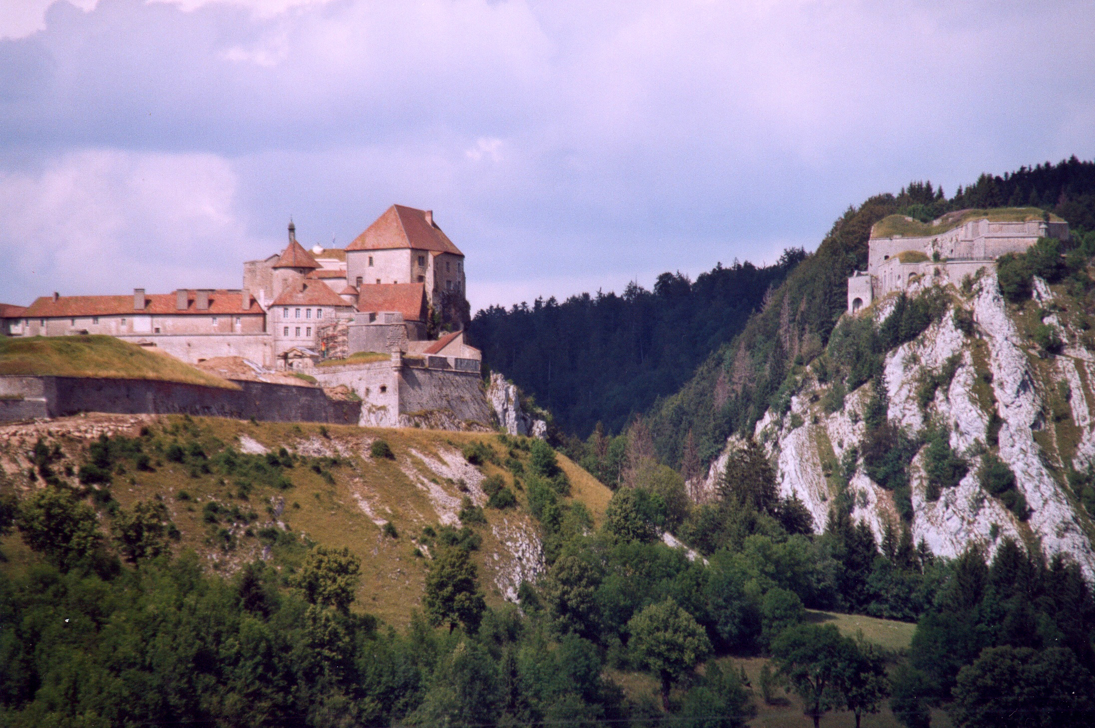 Fort de Joux Doubs France Photographie prise par Patrick GIRAUD Licensing Category:Fort de Joux